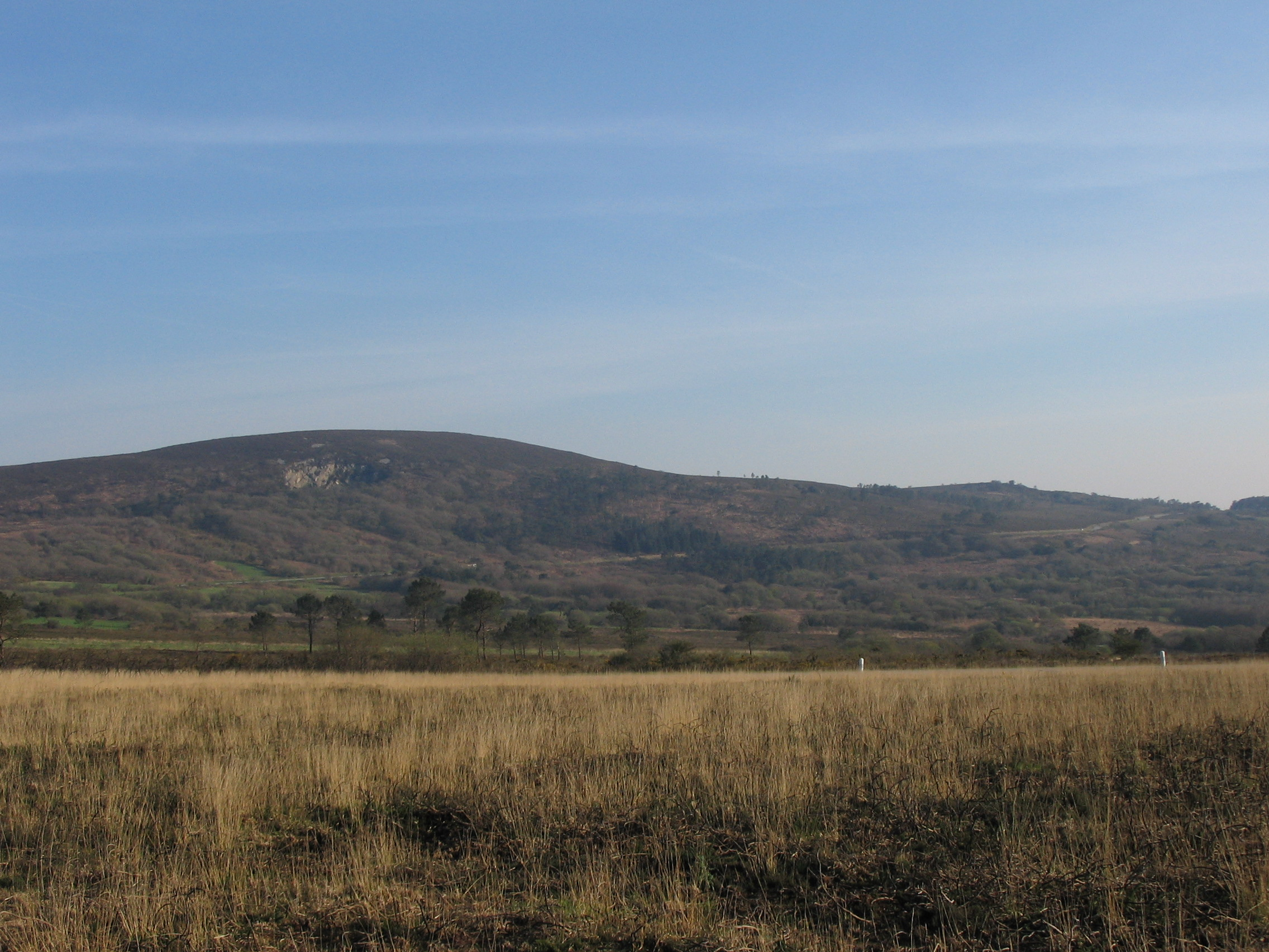 "Menez-Hom"